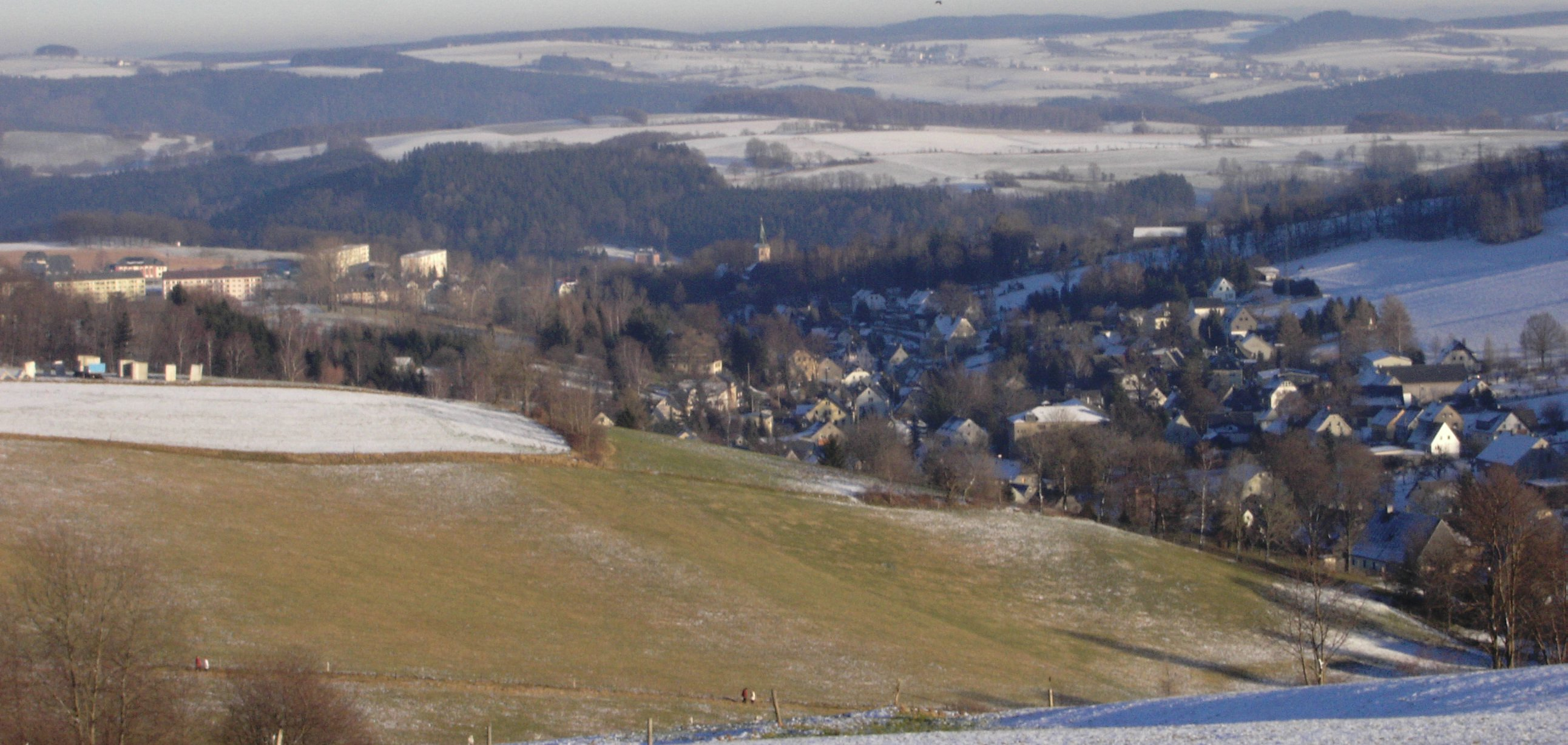 Gelenau